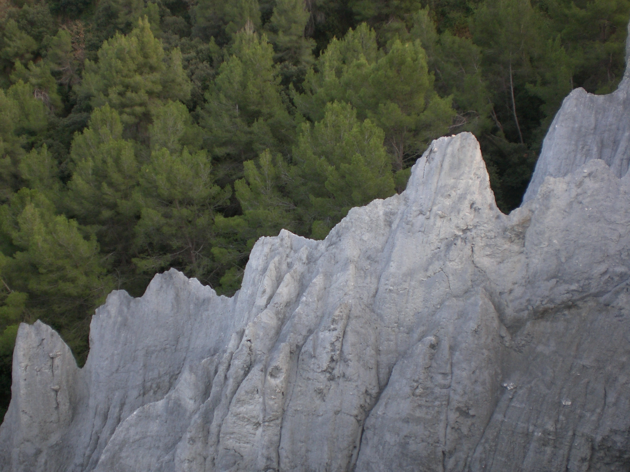 Ribes Blaves (febrer 2011)